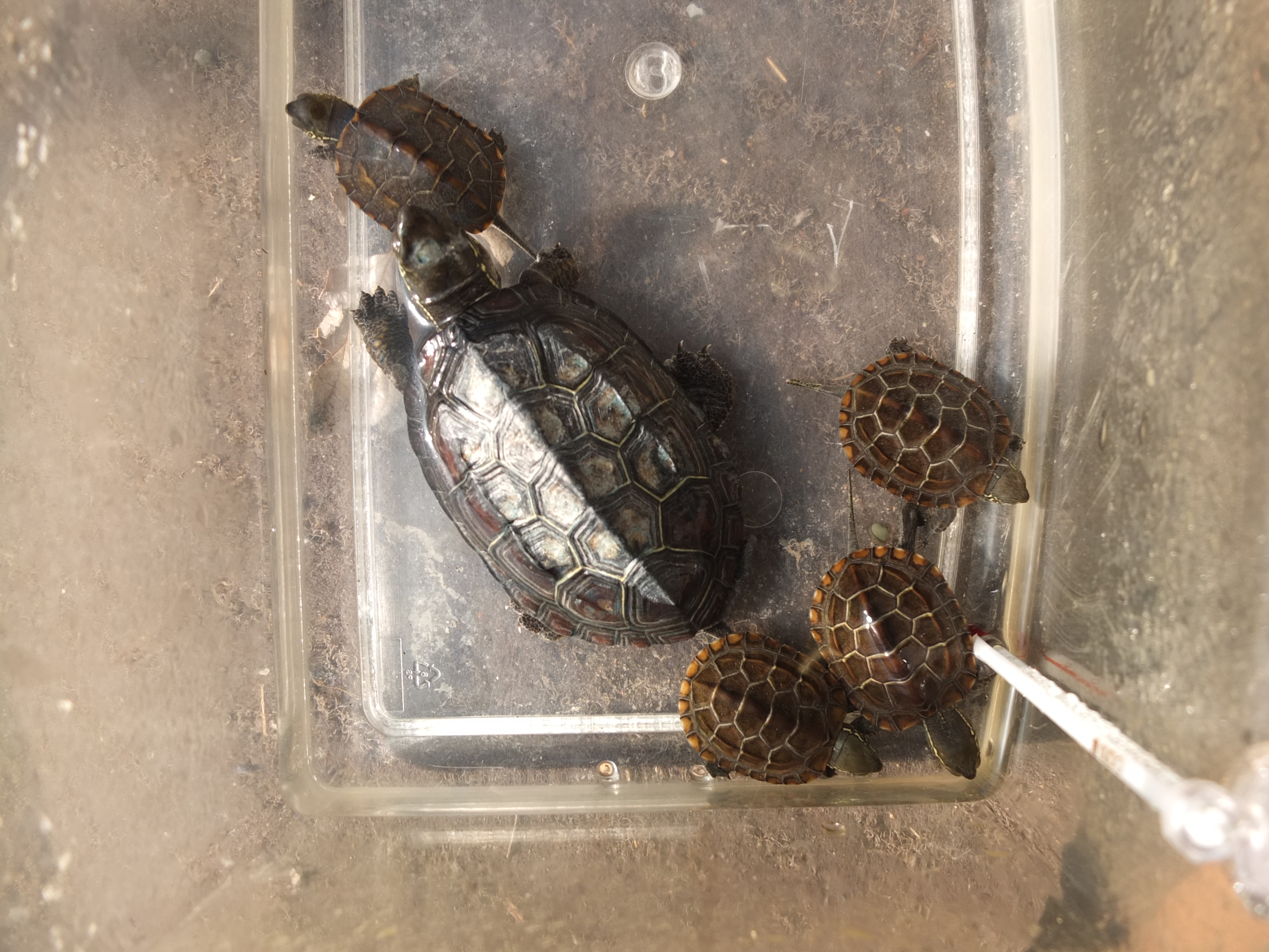 クサガメと、その子ガメであるゼニガメです。